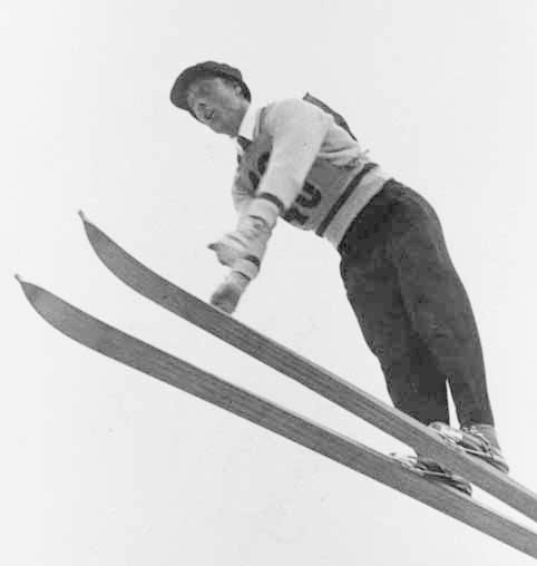 Sven Selånger, 1936 Olympics